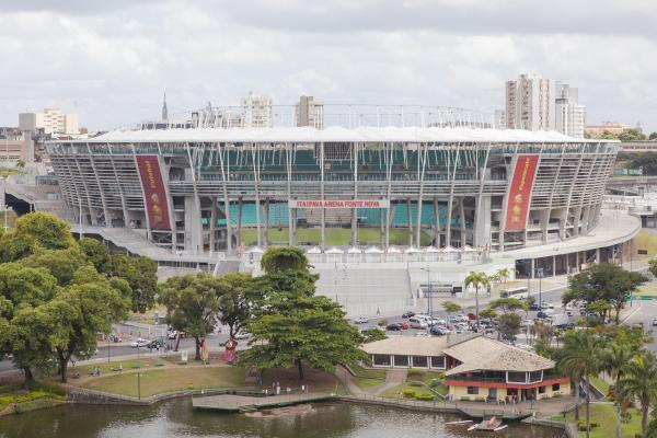 Vista frontal da Arena Fonte Nova, Salvador, Bahia.